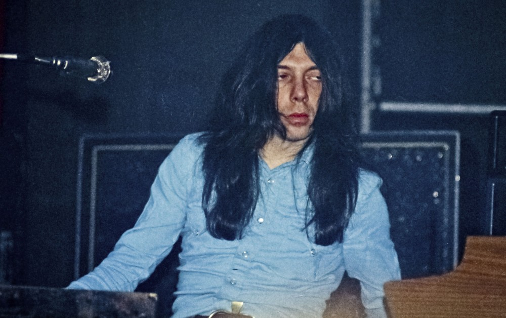 Peter Bardens, en concert à Zürich en 1975.